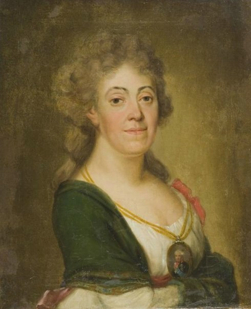 Анна Александровна Обольянинова, урожденная Ермолаева, в 1-м браке Ордын-Нащекина (1754—-1822)